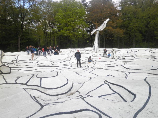 Werk: Jardin d'émail; Kunstenaar: Jean Dubuffet; Jaar: 1974; Straat: Beeldentuin van Kröller-Müller Museum